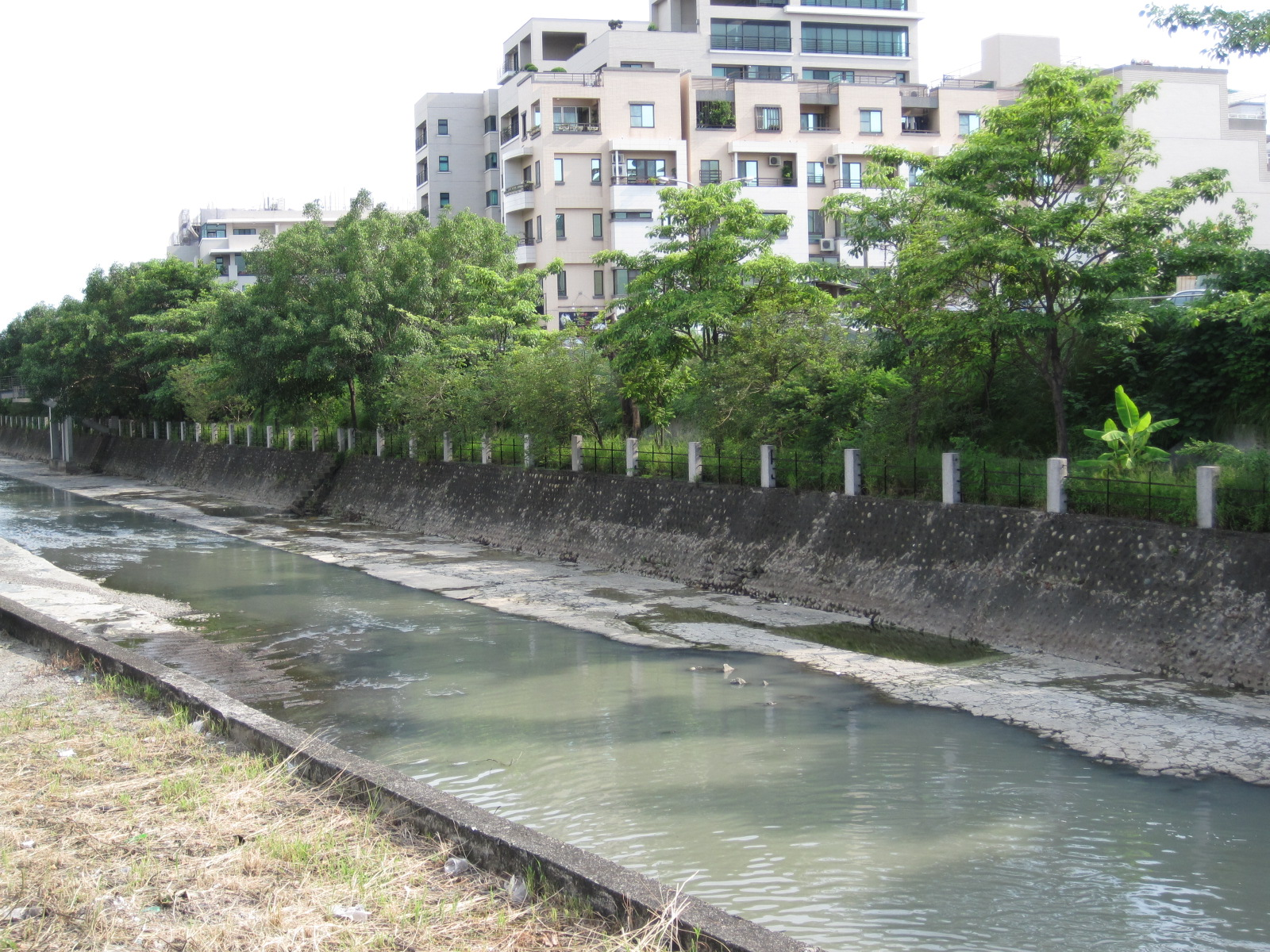 竹溪位於體育公園附近的河段